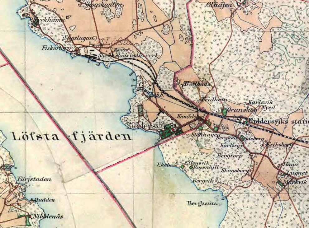 Del av Häradsekonomiska kartan, Svartsjö J112-75-13